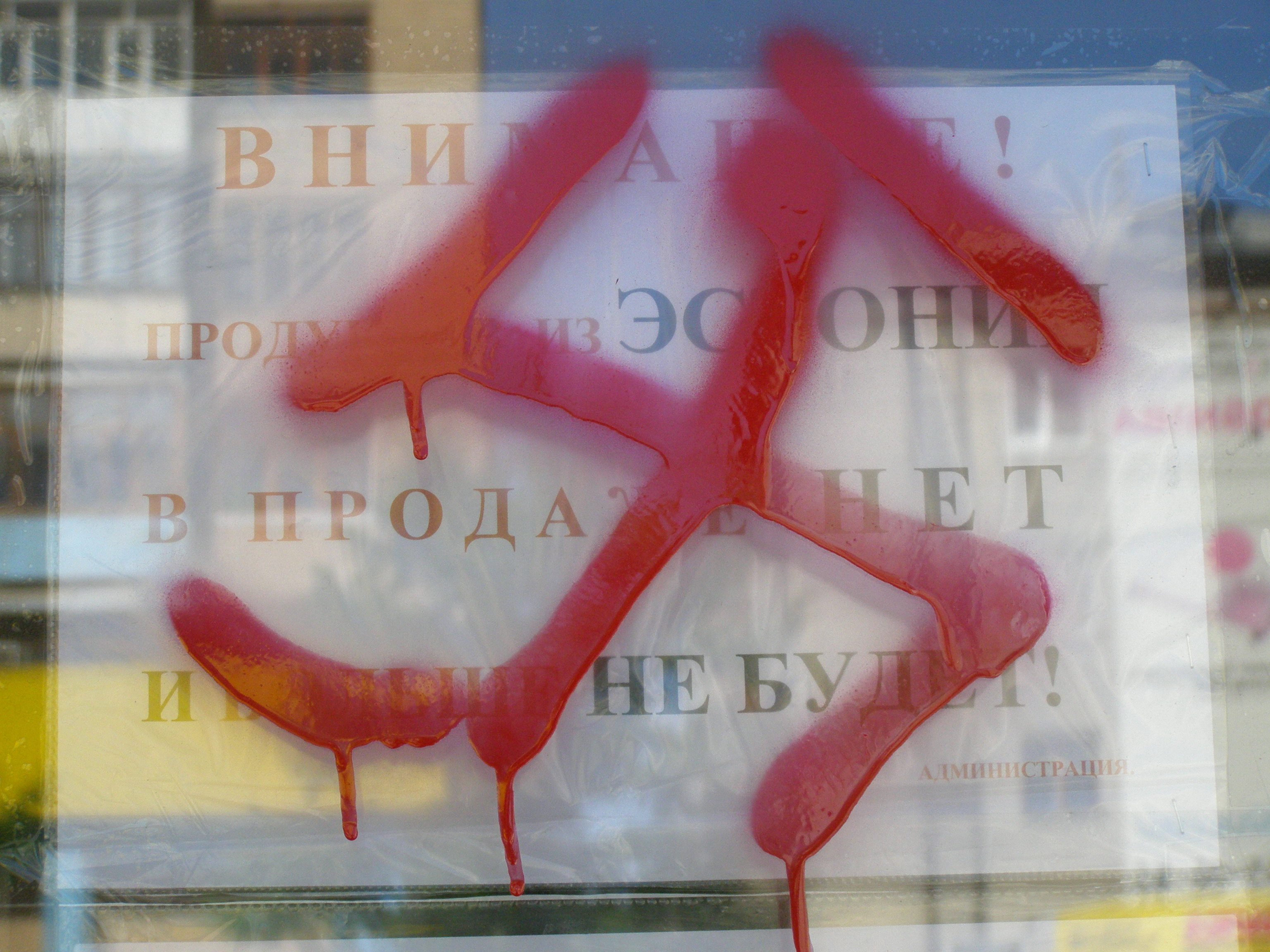 Svastiko sur vendejo "Tamara" sur strato Respubliki super anonco en la rusa: "Ni anoncas ke varoj el Estonio mankas kaj aperos neniam". Tjumeno, Rusio. Temas pri reago al transloko de la Bronza Soldato en Talino (Estonio).